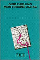 Gedichtband